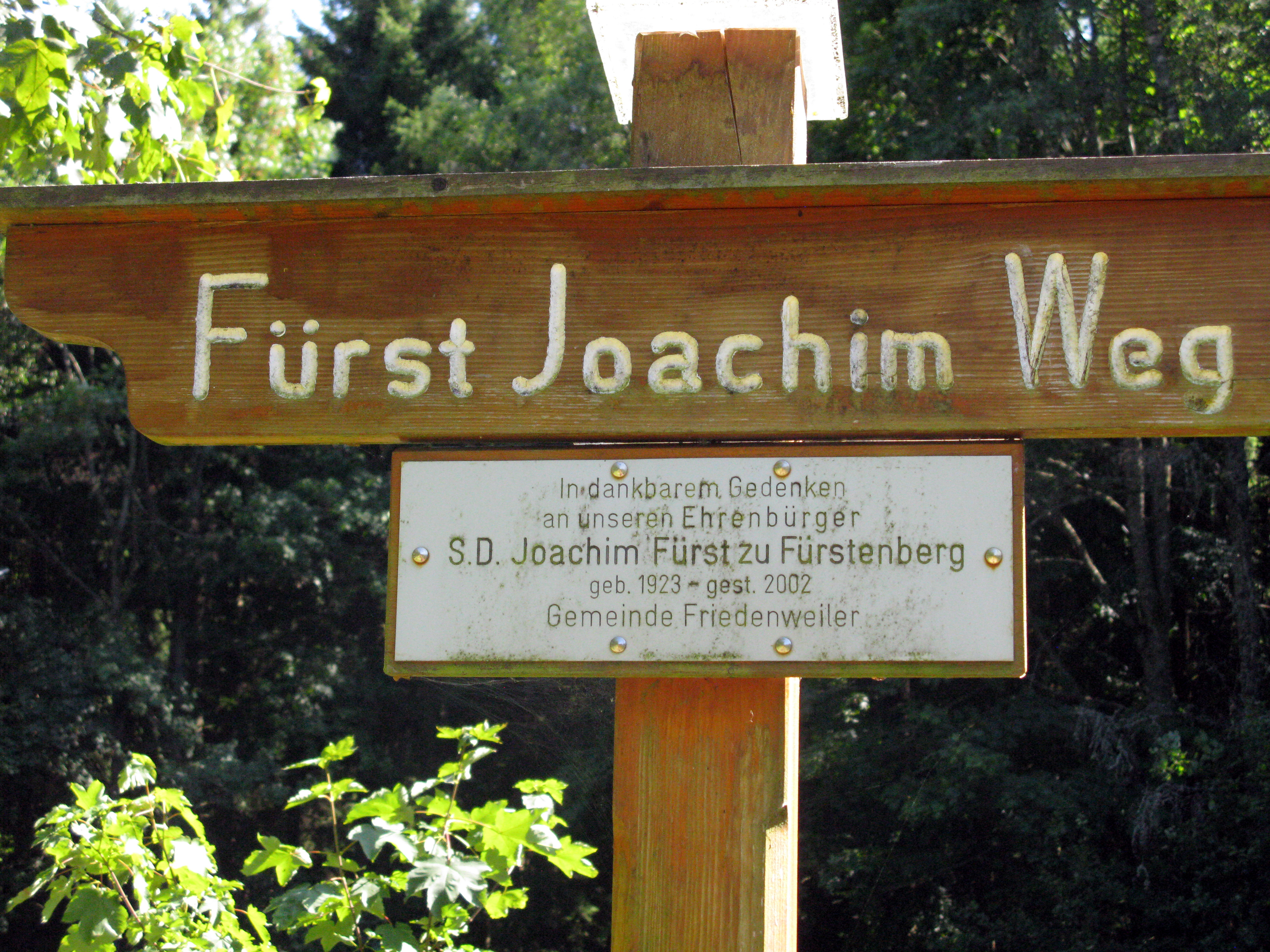 Fürst Joachim Weg, Wegweiser mit Inschrift: In dankbarem Gedenken an unseren Ehrenbürger S.D. Joachim Fürst zu Fürstenberg geb. 1923 - gest. 2002, Gemeinde Friedenweiler